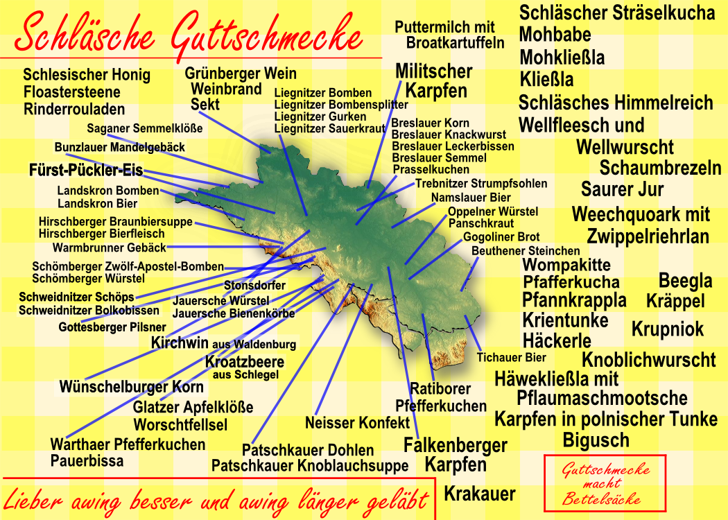 Kulinarische Karte Schlesiens Schläsch: Kulinarische Koarte Schläsings